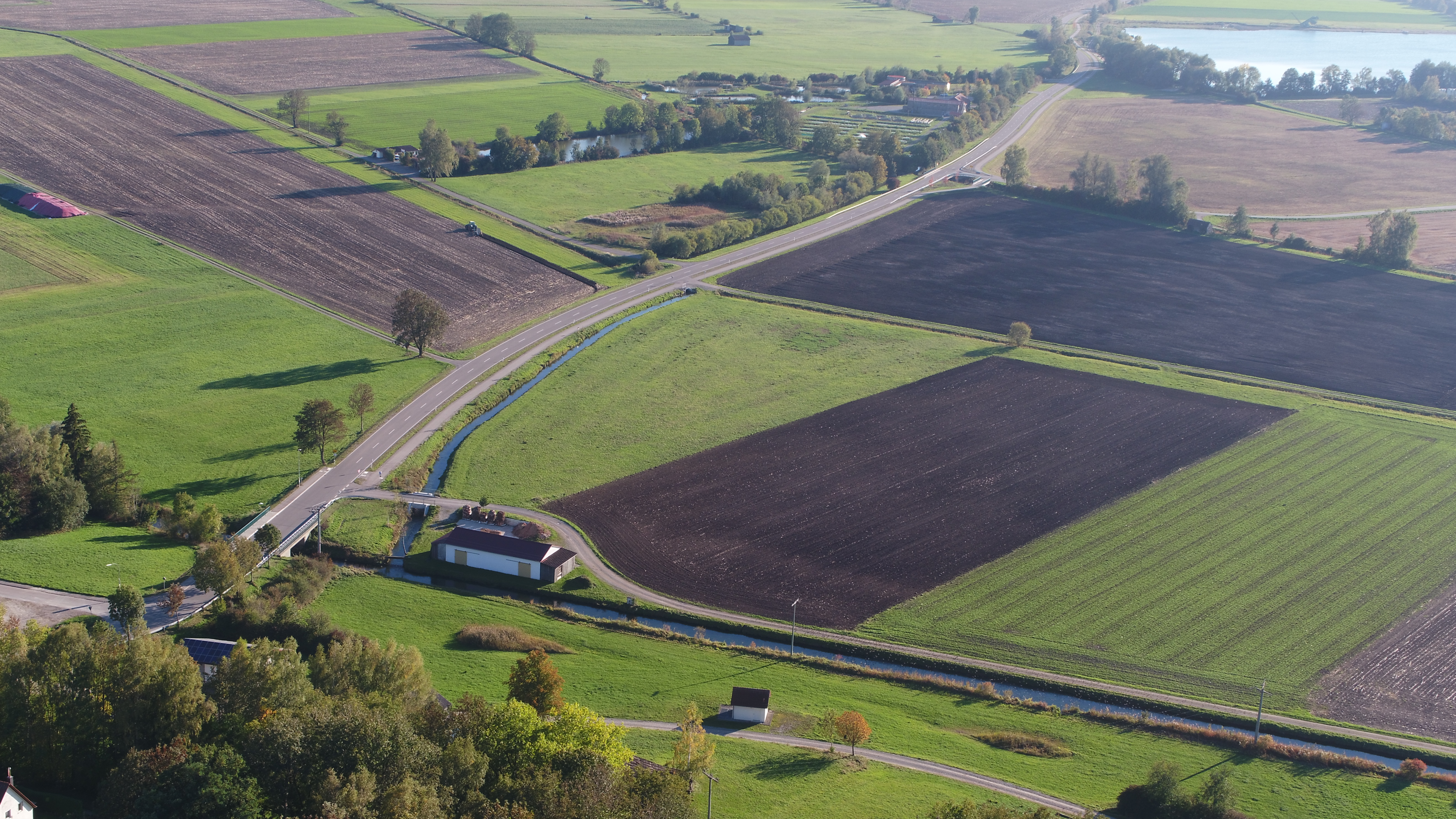 Mündung des Riedbrunngraben in die Flossach bei Mörgen, Gemeinde Eppishausen. Im Hintergrund der Schwäbische Fischereihof des Bezirks Schwaben. Groß im Bild die Kreisstraße MN 3